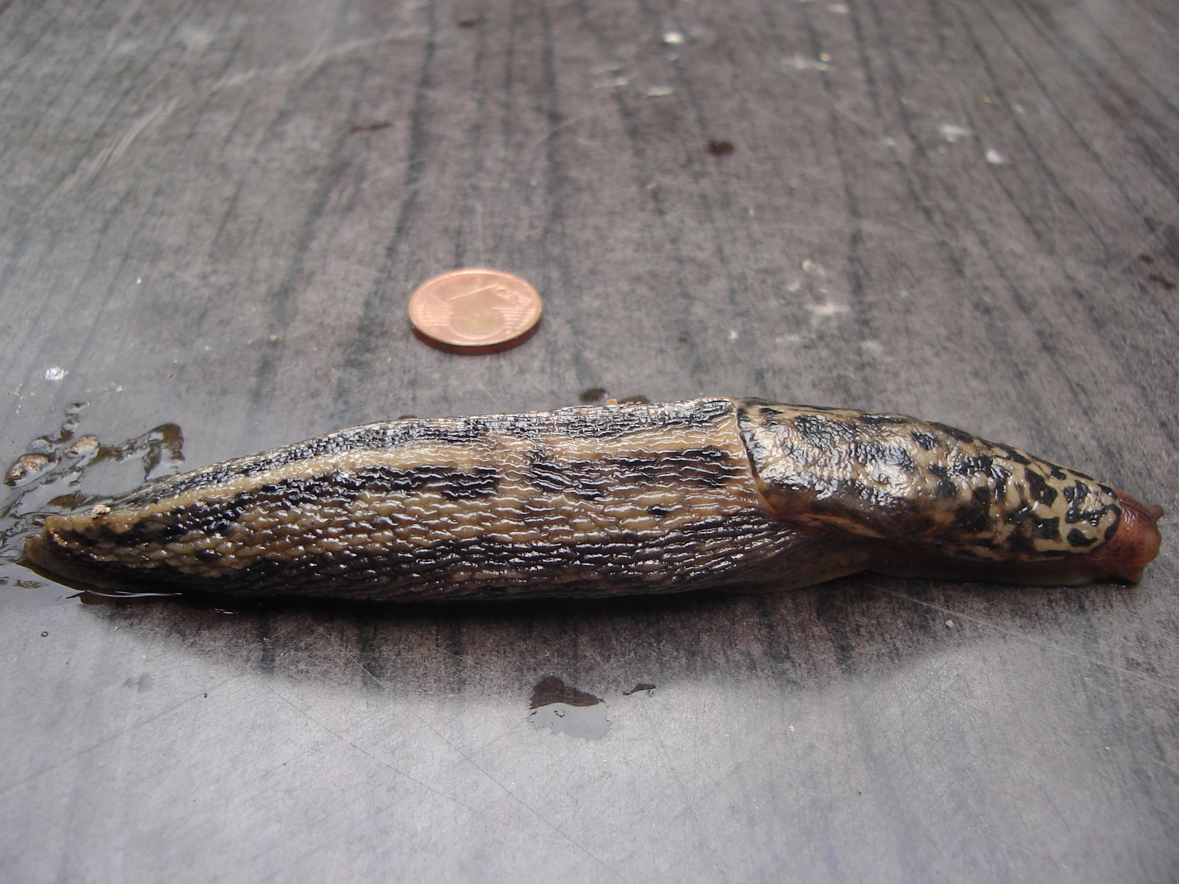 Schnecke, bevor sie Schneckenkorn frisst